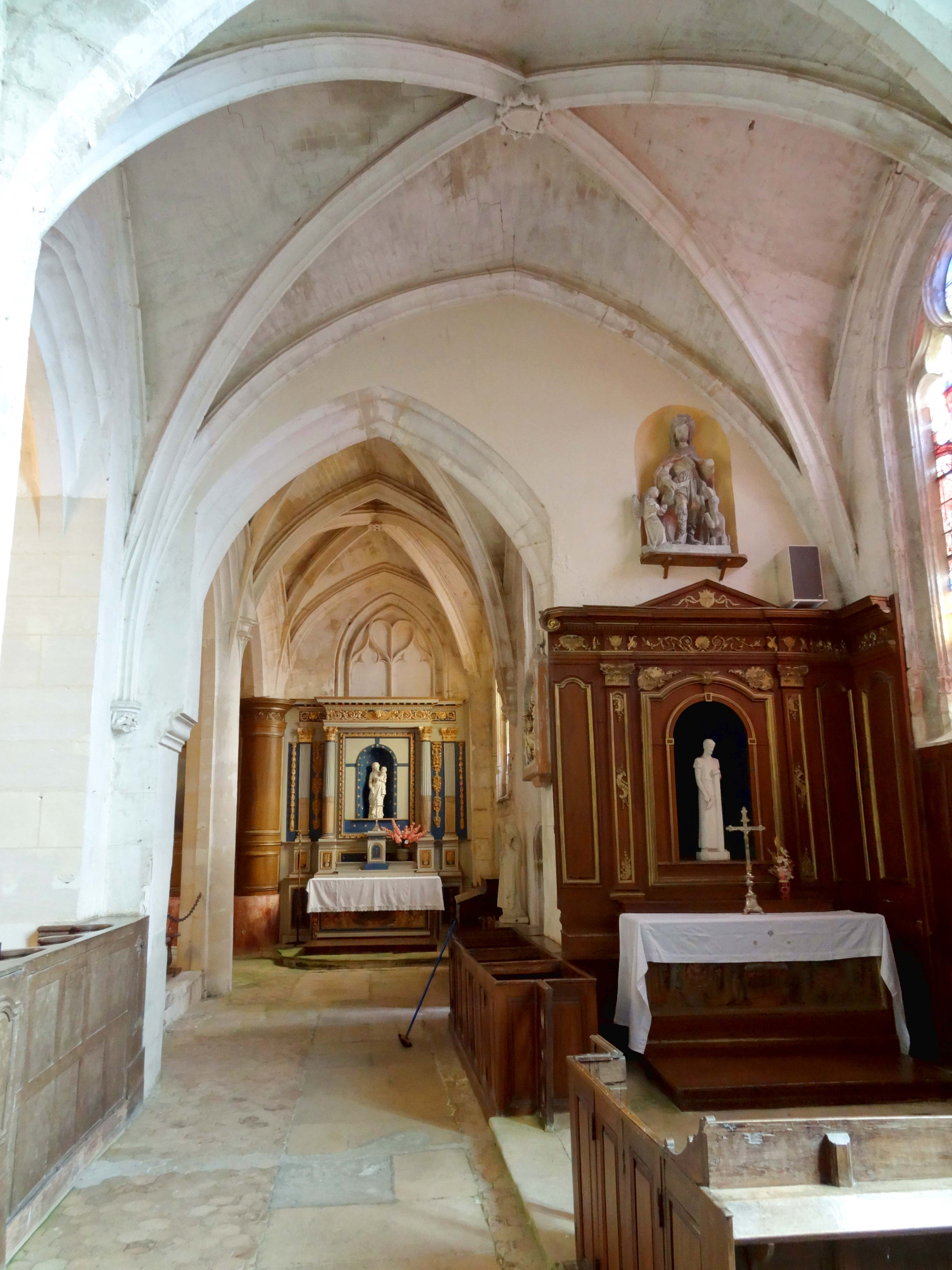 Intérieur de l'église - voir titre.